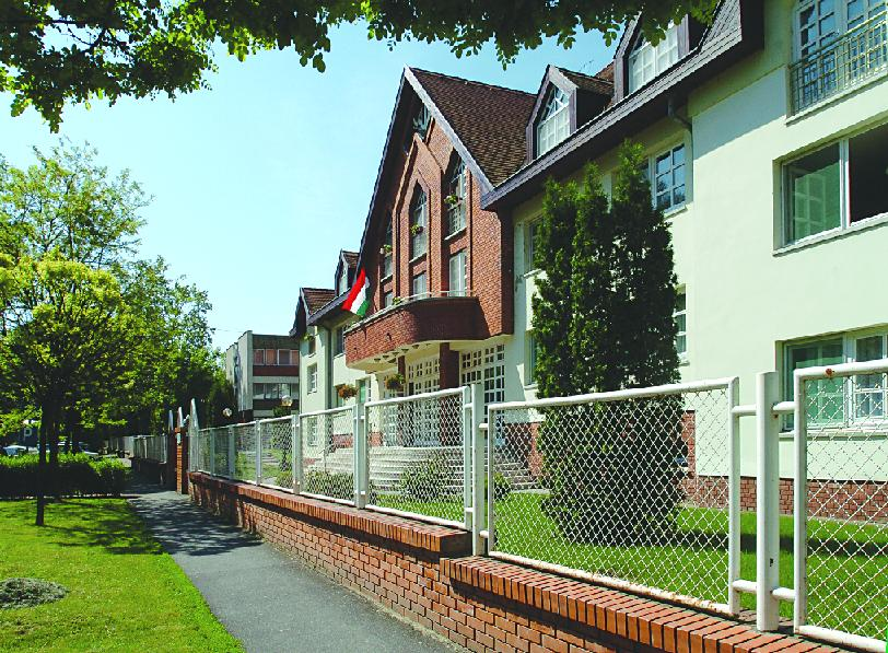 Hajdúböszörményi Pedagógiai Főiskola